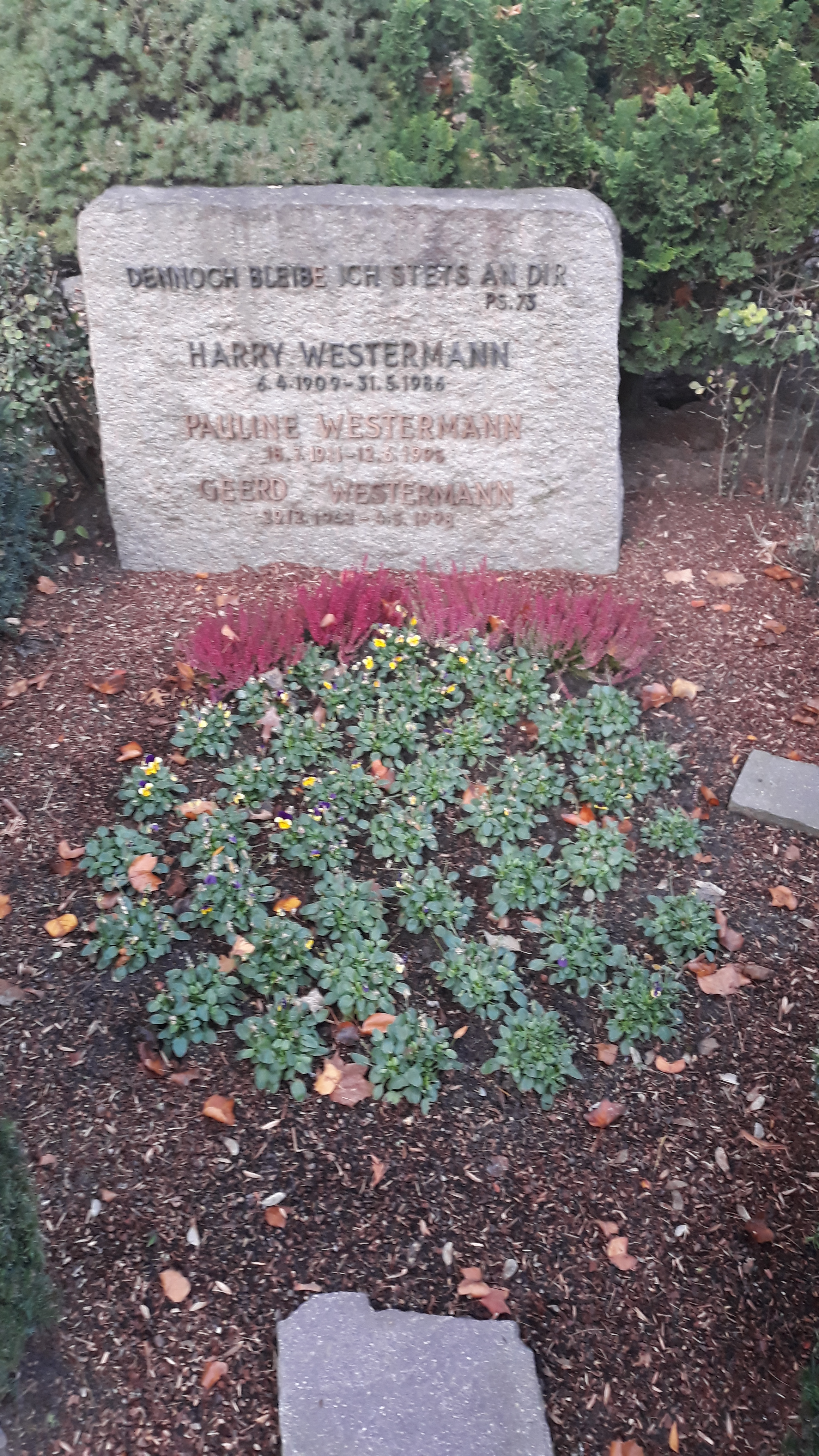 Das Familiengrab des deutschen Zivilrechtlehrers Harry Westermann auf dem Zentralfriedhof Münster.